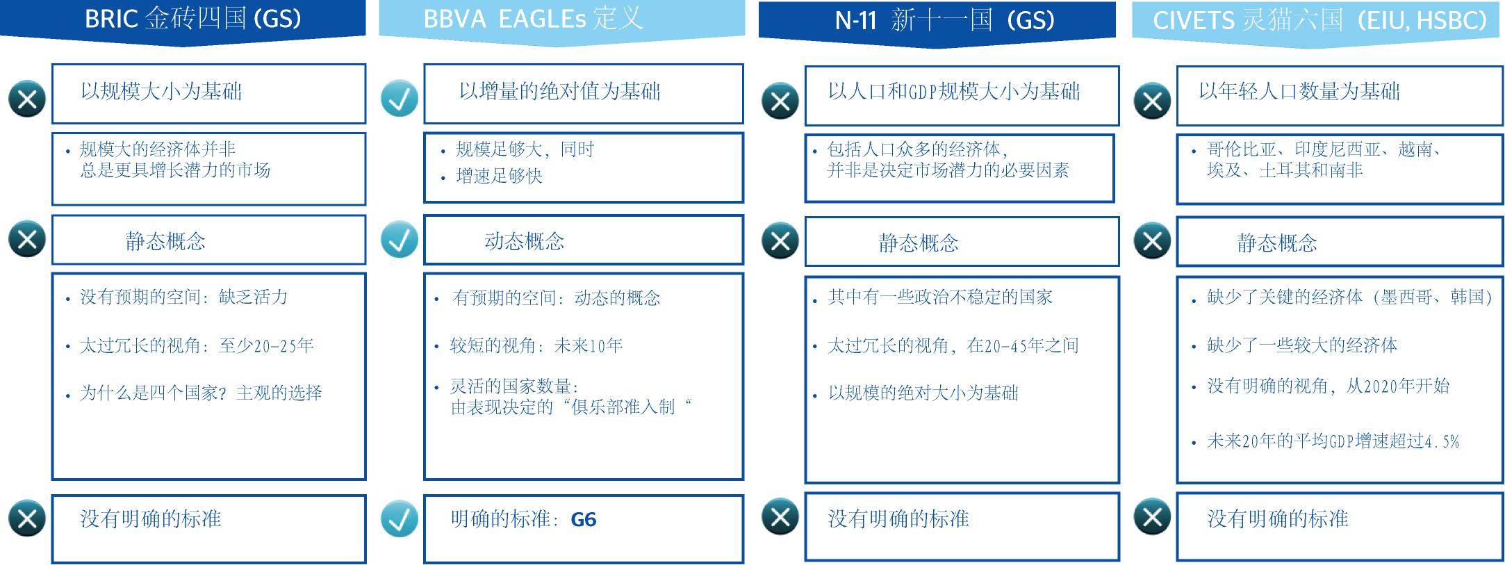 EAGLEs和其他新兴市场概念